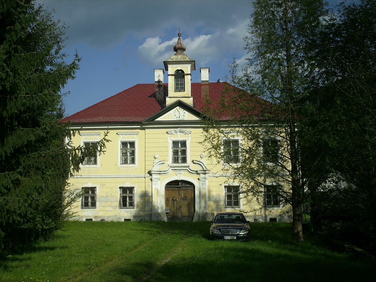 Westfassade des ehem. Gewerkenschloss mit Nebengebäuden und Kraftwerk in Kindberg/Österreich.